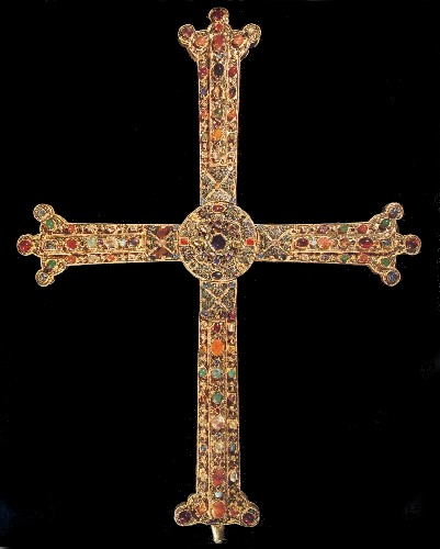 Cruz de la Victoria, conservada en el interior de la Cámara Santa de Oviedo.